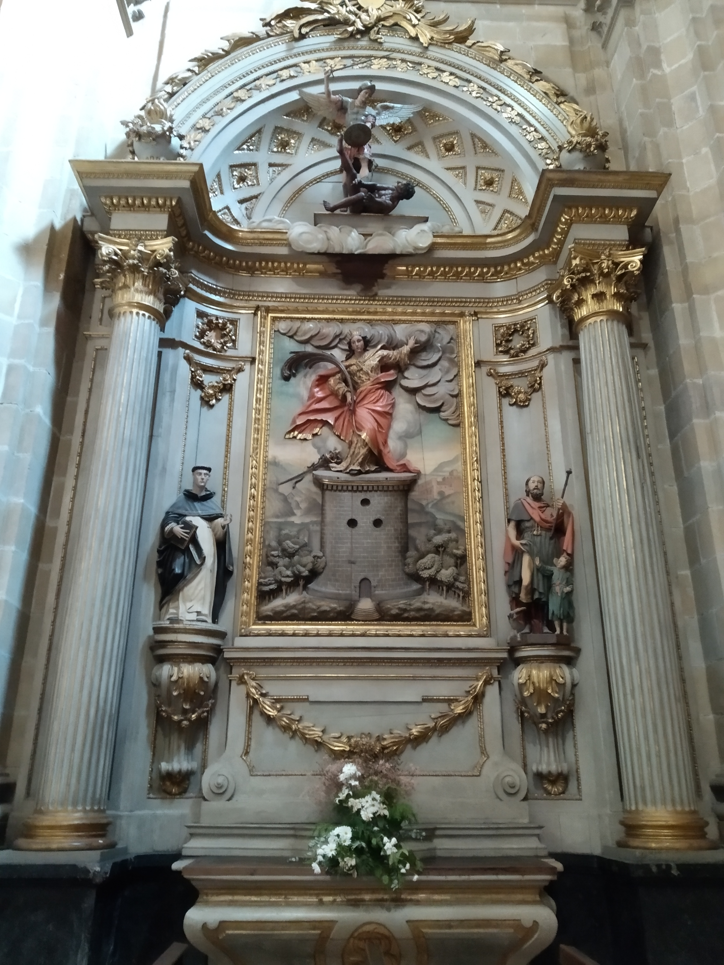 Santa Maria basilika. Santa Barbararen errataula, neoklasikoa, 1775. urte ingurukoa. Francisco Azurmendik egina, Diego Villanuevaren trazari jarraituz. Alde bietan San Roke eta Santo Domingo irudikatzen omen dituzten eskulturak; atikoan Mikel goiaingeruak deabruari irabazten diola irudikatzen duen taila